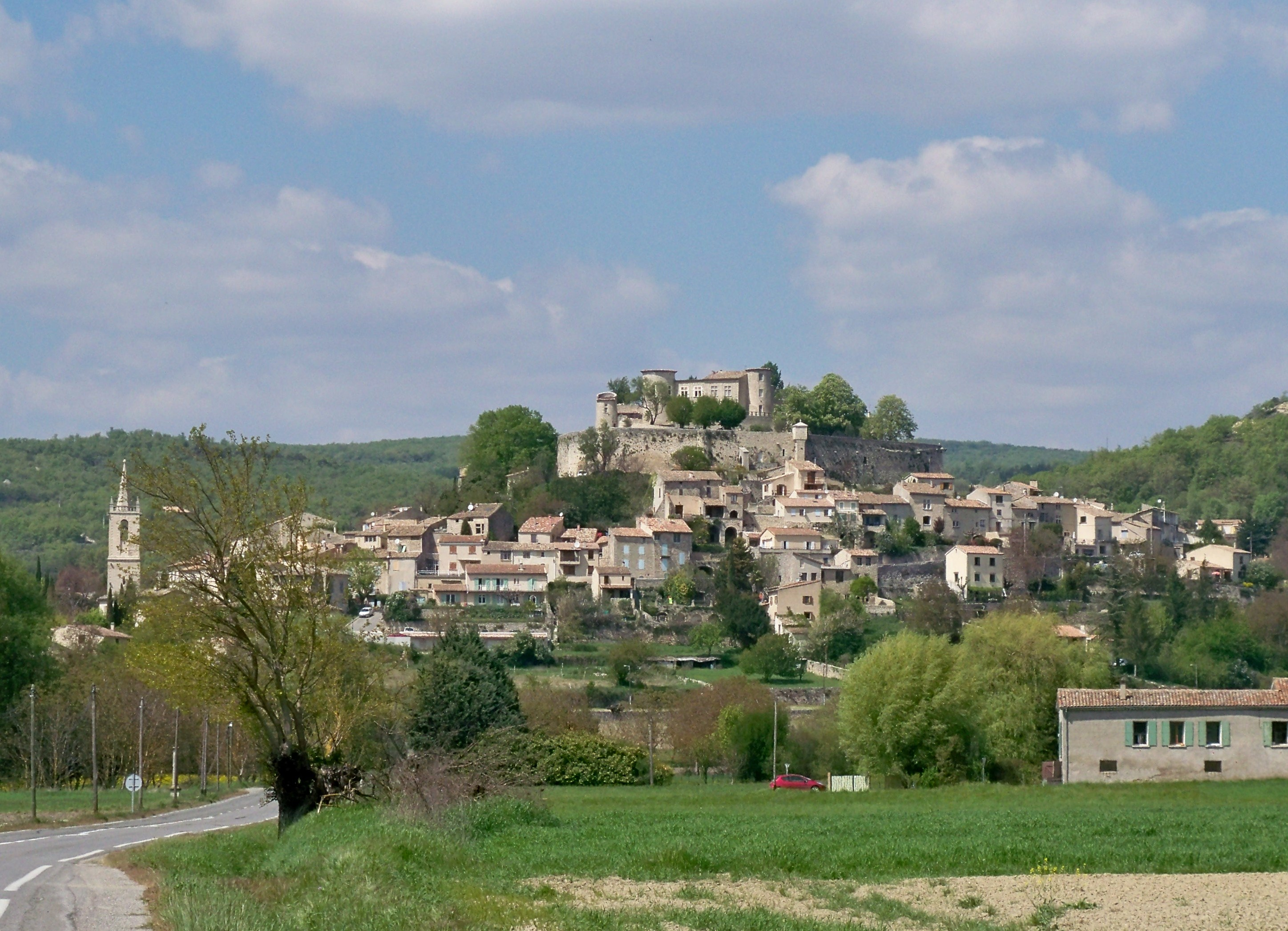 vue sur le village de Mane (04)